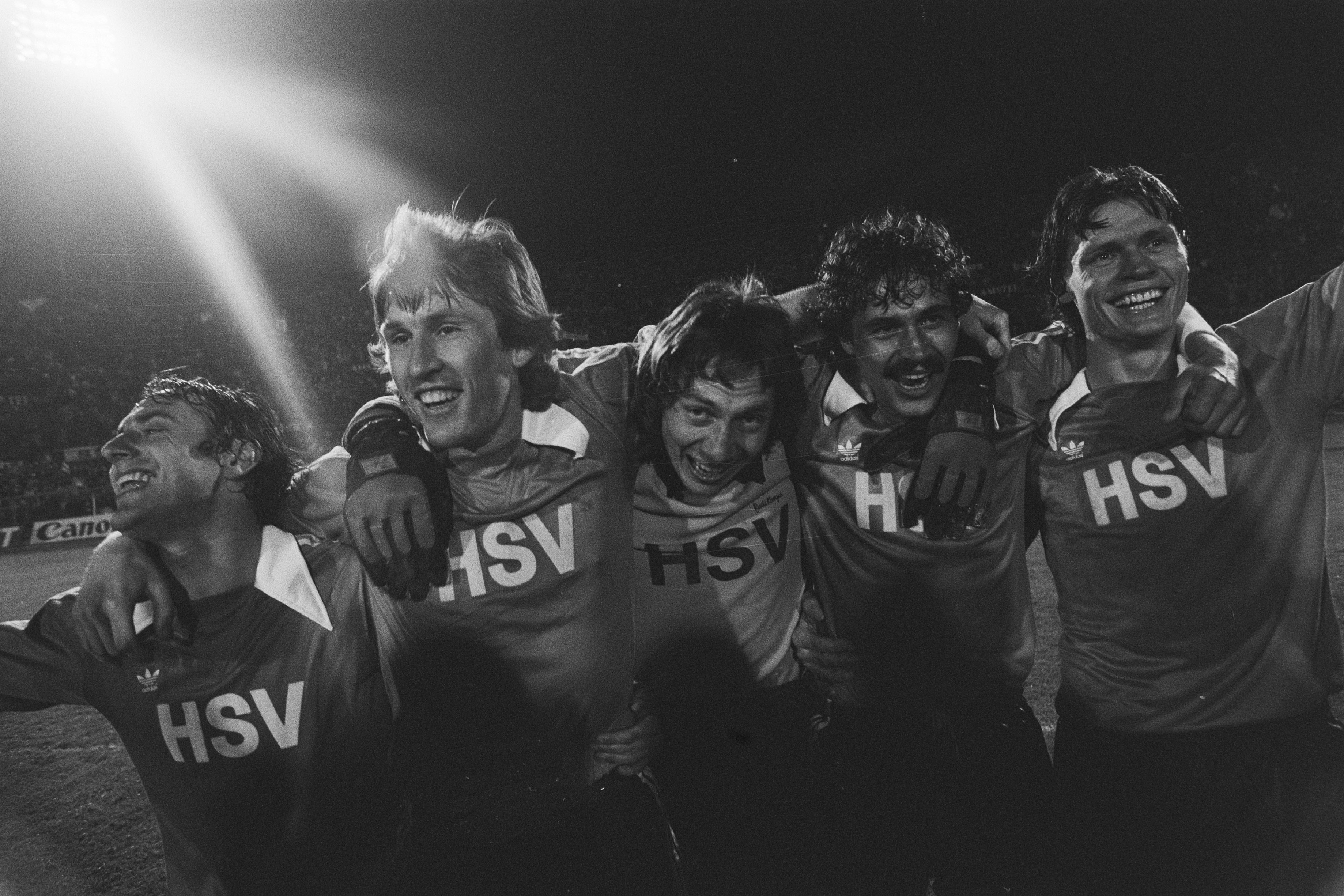 Collectie / Archief : Fotocollectie Anefo Reportage / Serie : [ onbekend ] Beschrijving : Anderlecht tegen HSV (finale Europa Cup II ); vreugde bij HSV na afloop Datum : 11 mei 1977 Locatie : Amsterdam Trefwoorden : sport, voetbal Fotograaf : Peters, Hans / Anefo Auteursrechthebbende : Nationaal Archief Materiaalsoort : Negatief (zwart/wit) Nummer archiefinventaris : bekijk toegang 2.24.01.05 Bestanddeelnummer : 929-1737